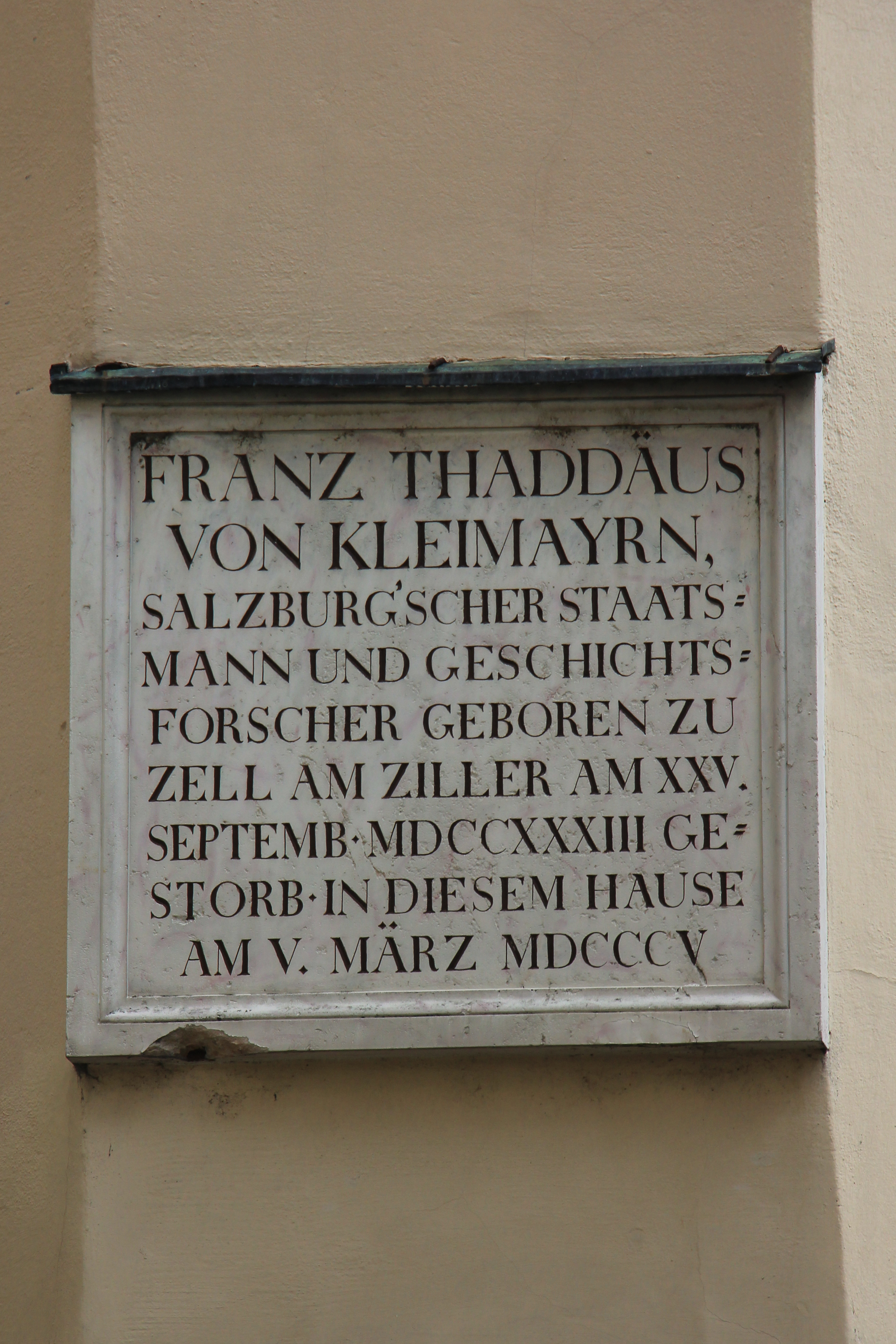 Tafel für Franz von Kleimayrn in Salzburg